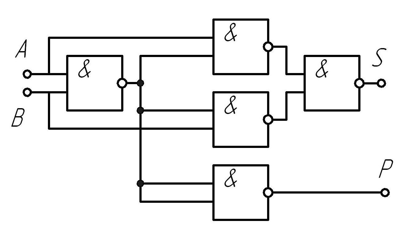 Функціональна схема півсуматора